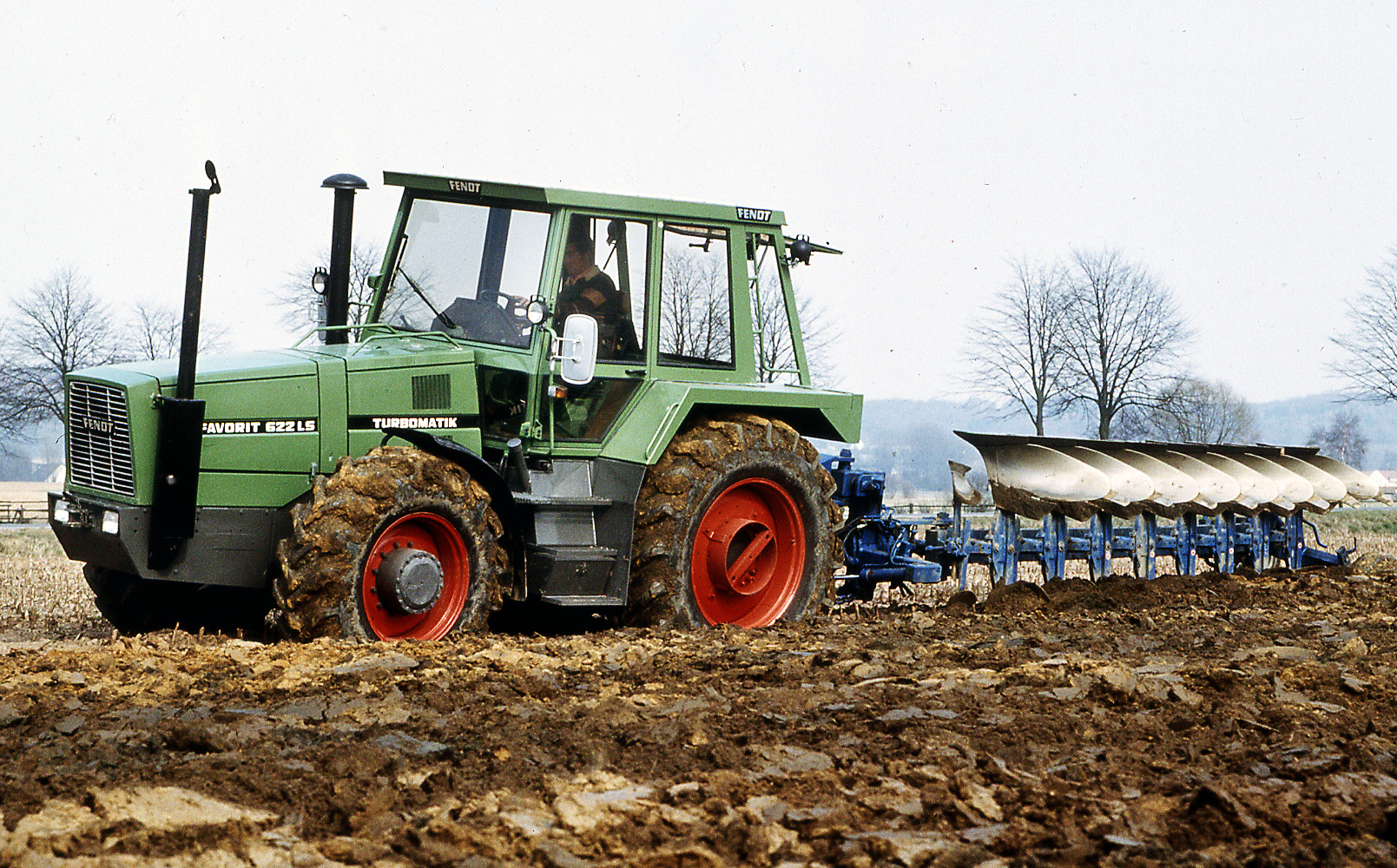 Fendt Favorit 622 LS, auch bekannt als Nasenbär